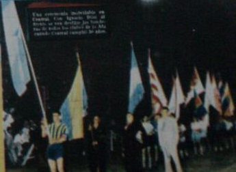 Desfile por el Cincuentenario de Rosario Central; en segundo lugar, portando la bandera del club, se encuentra Zenón Díaz.